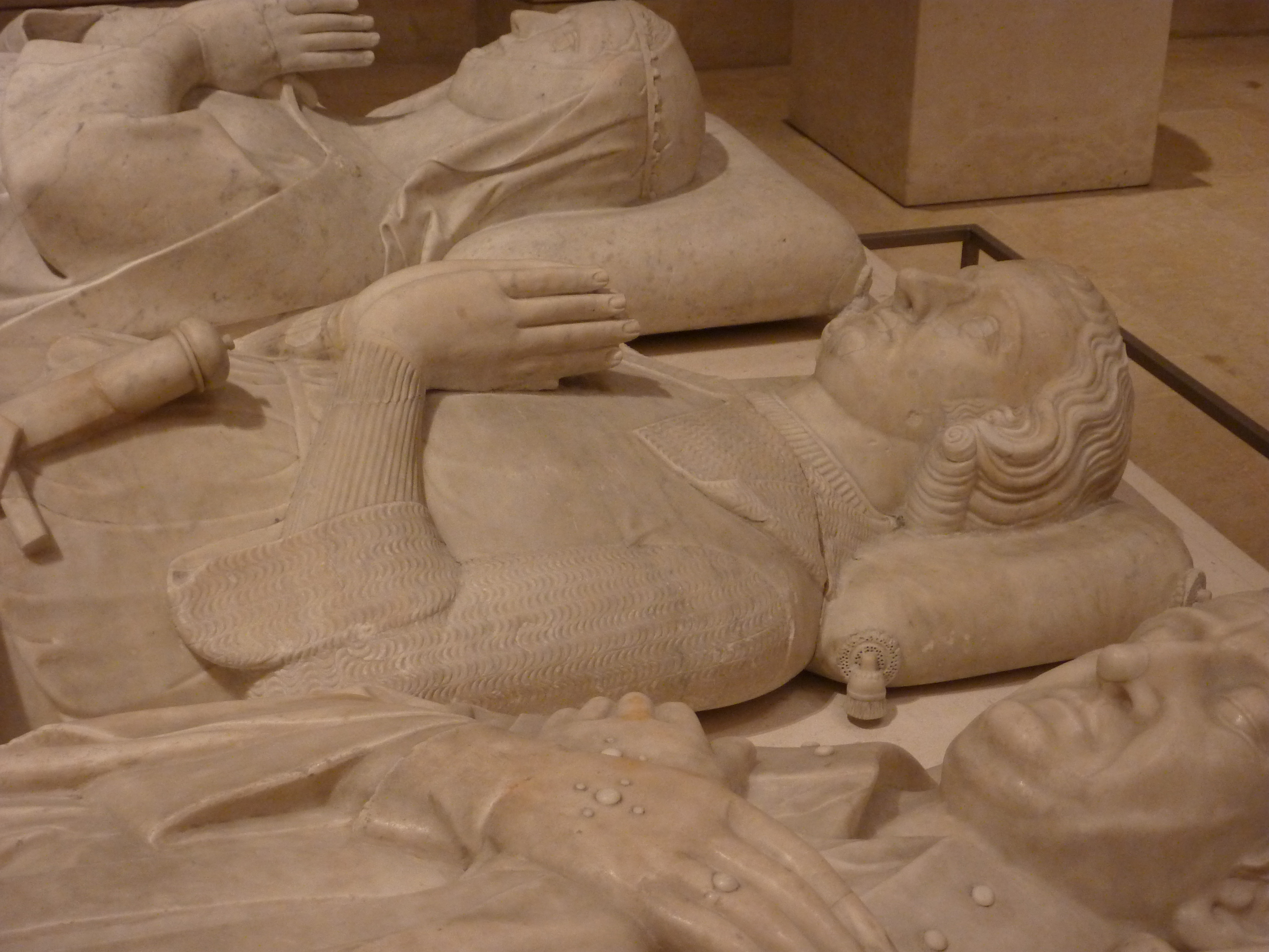 Situé au musée du Louvre.